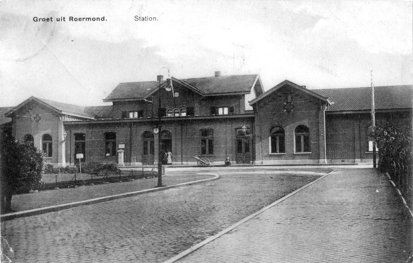 Stationsplein te Roermond, met links het Hotel de la Station en rechts het station Roermond; circa 1900. Collectie van het Utrechts Archief.